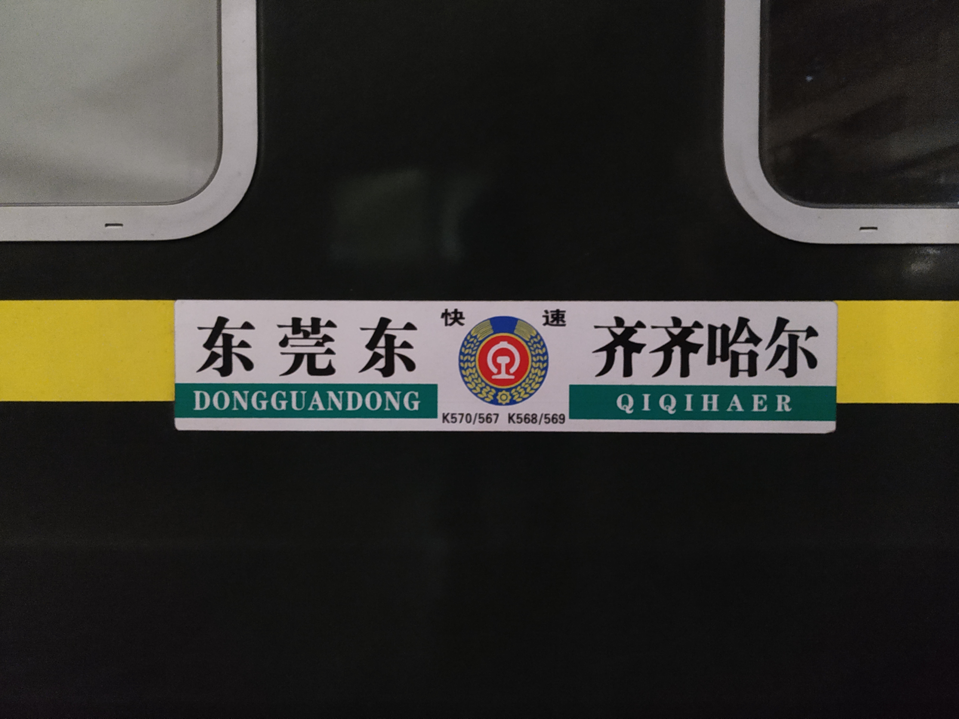 中文（中国大陆）: 东莞东至齐齐哈尔的K567次列车水牌